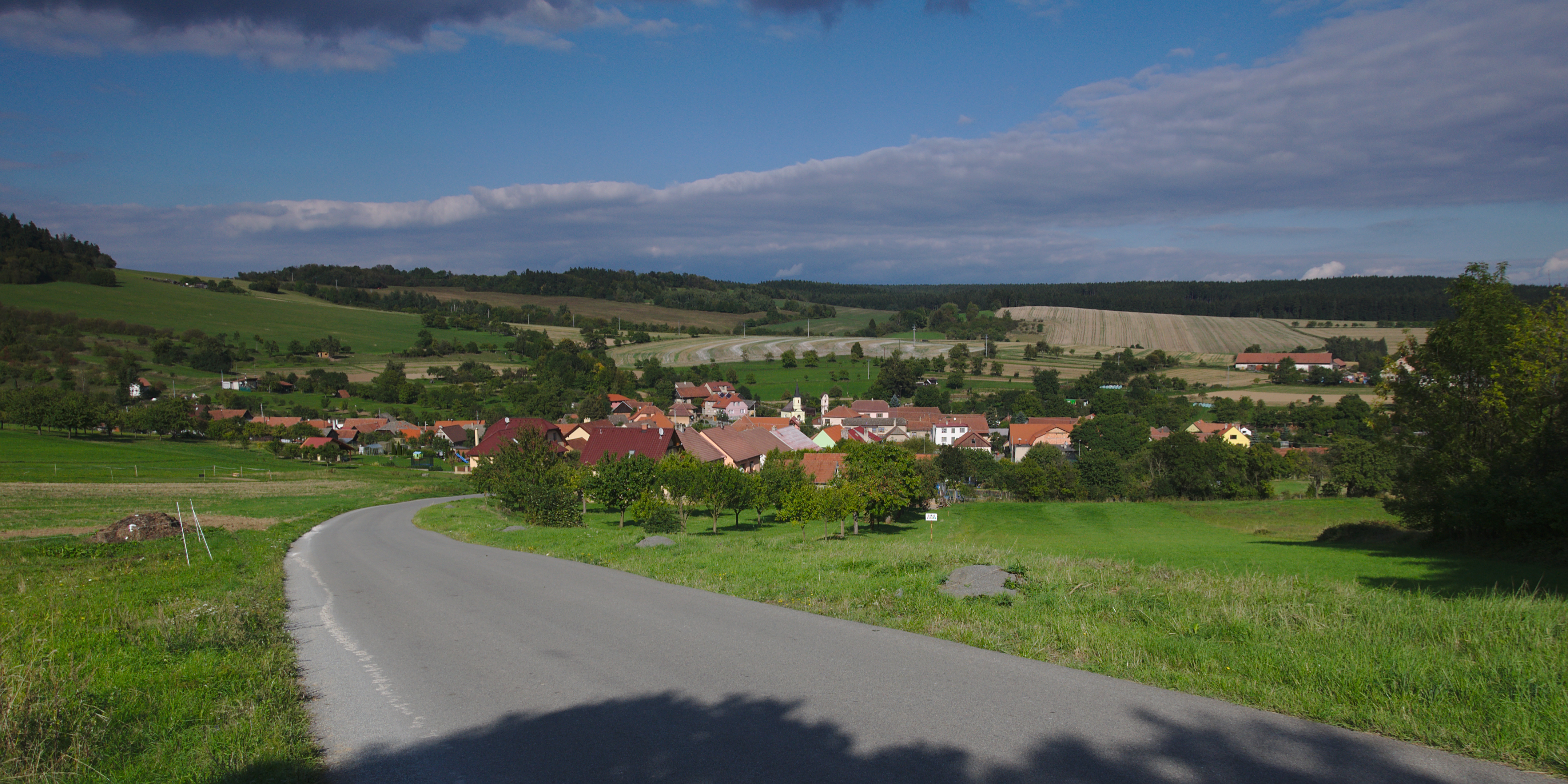 Pohled na obec od jihu, Brumov, okres Brno-venkov